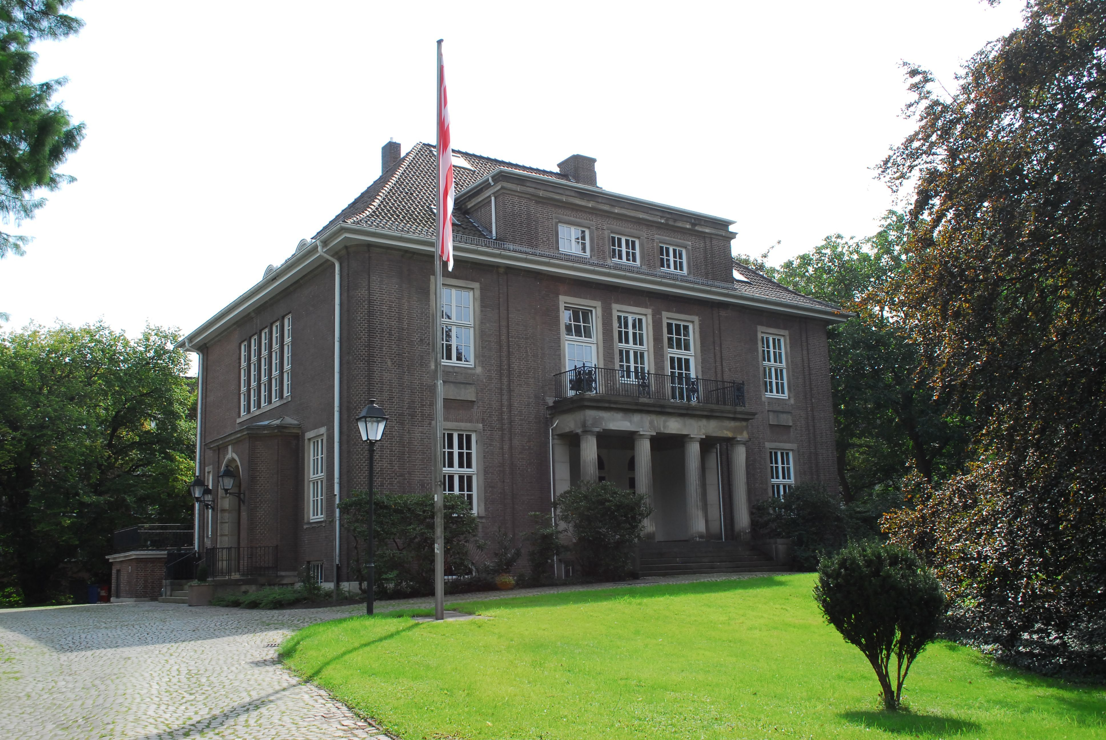 Villa Schütte in Bremen, Schwachhauser Heerstraße 67.Das abgebildete Objekt ist ein geschütztes Kulturdenkmal in der Freien Hansestadt Bremen, mit der Nr. 1122 beim Landesamt für Denkmalpflege registriert.